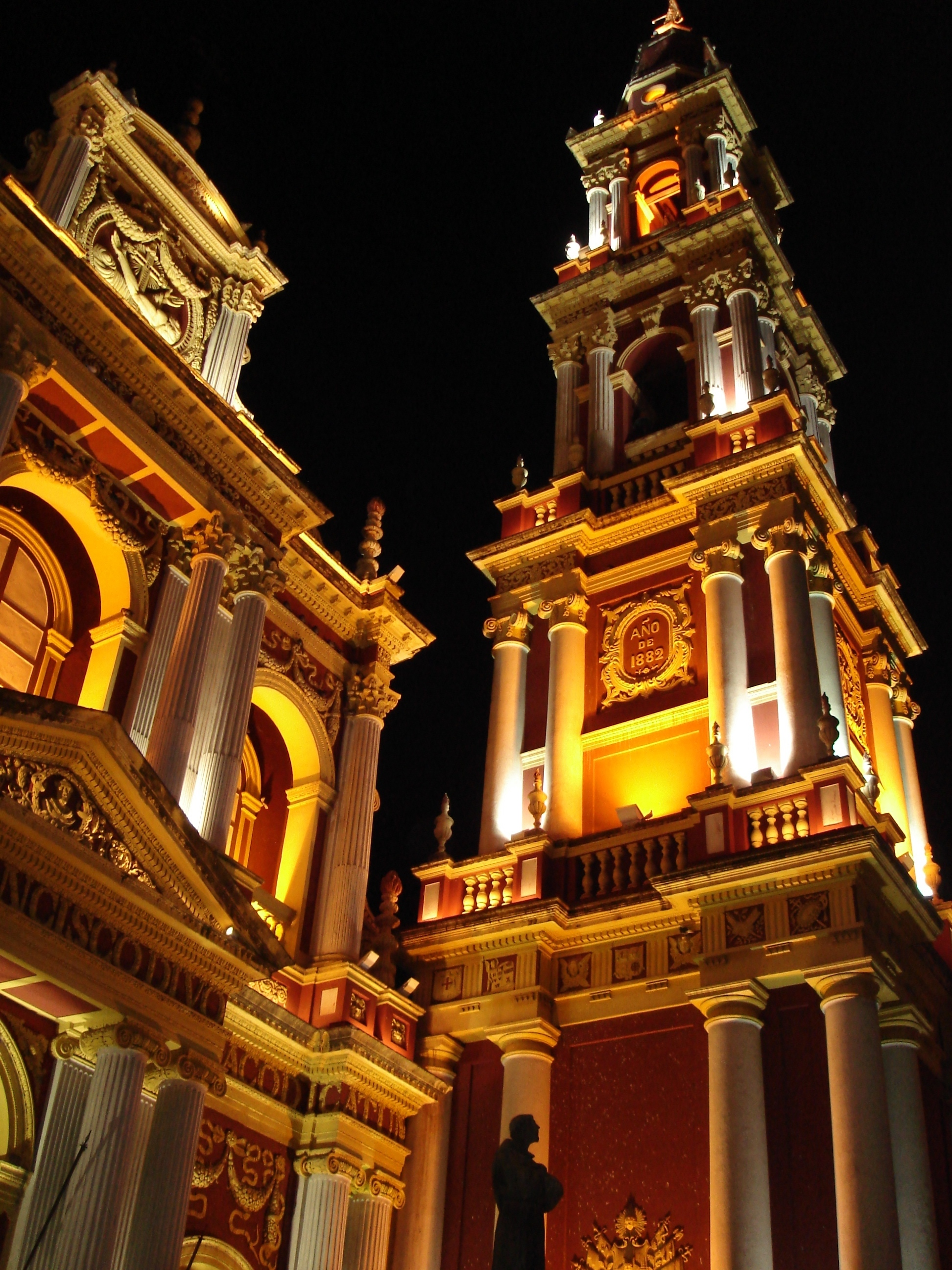 Convento de San Francisco, Salta, Argentina